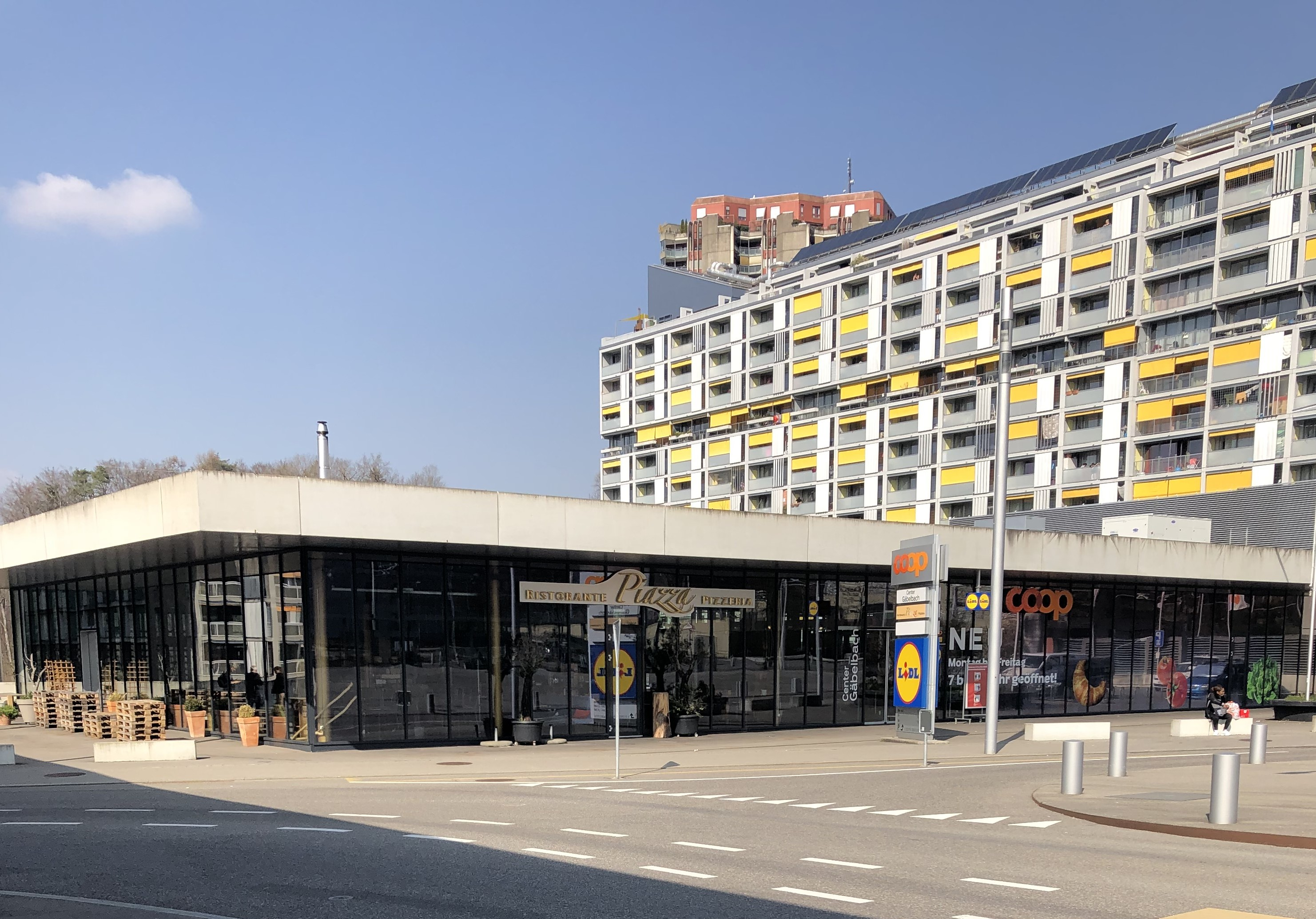 Gaebelbach Ansermetplatz (Zentrum mit Restaurant und Läden)